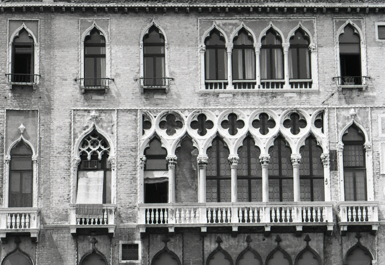 Serie fotografica : Venezia, 1969 / Paolo Monti. - Strisce: 7, Fotogrammi complessivi: 37 : Negativo b/n, gelatina bromuro d'argento/ pellicola ; 35 mm. - ((I fotogrammi hanno una doppia numerazione. . - Sul portanegativi: Nikon FP4. - All'interno del portanegativi Monti specifica alcuni soggetti. - Fonte: Agenda di Paolo Monti: Monti - Agenda 1969 (1969), presso Archivio Paolo Monti